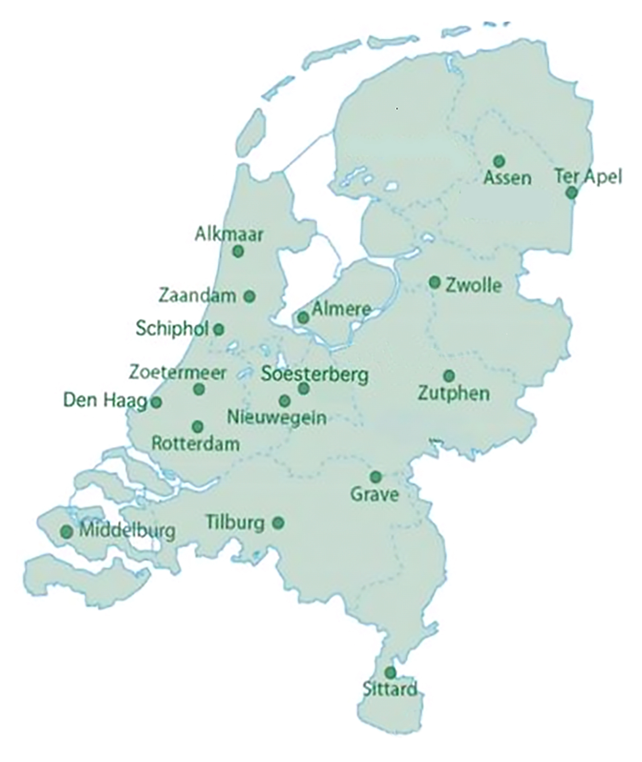 Locaties DV&O